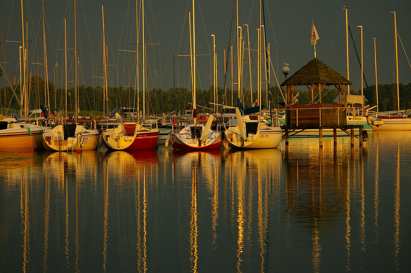 Ostróda. Przystań.